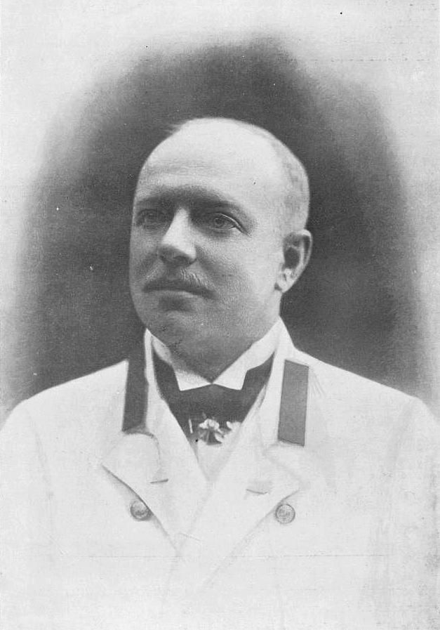 Юрий Львович Давыдов, чигиринский уездный предводитель дворянства, директор Киевского отделения Русского музыкального общества.